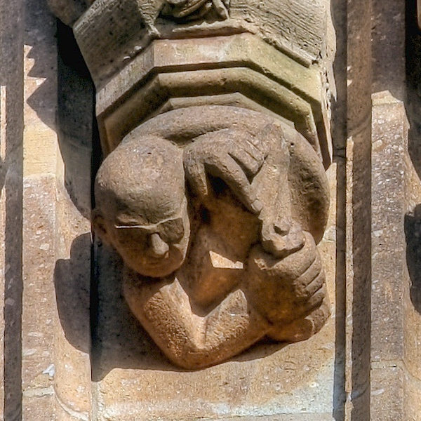 Rathausturm Köln. Konsole unter der Statue des Albertus Magnus: „Professor Dr. Walter Bader“. Bildhauer: Gerd Haas